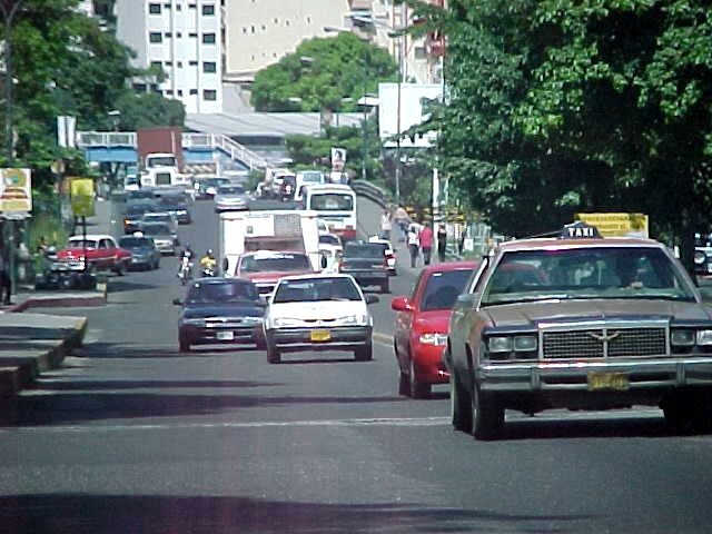 Puente de Los Leones (El Paraíso) en el municipio Libertador, Distrito Capital - Venezuela (2000)